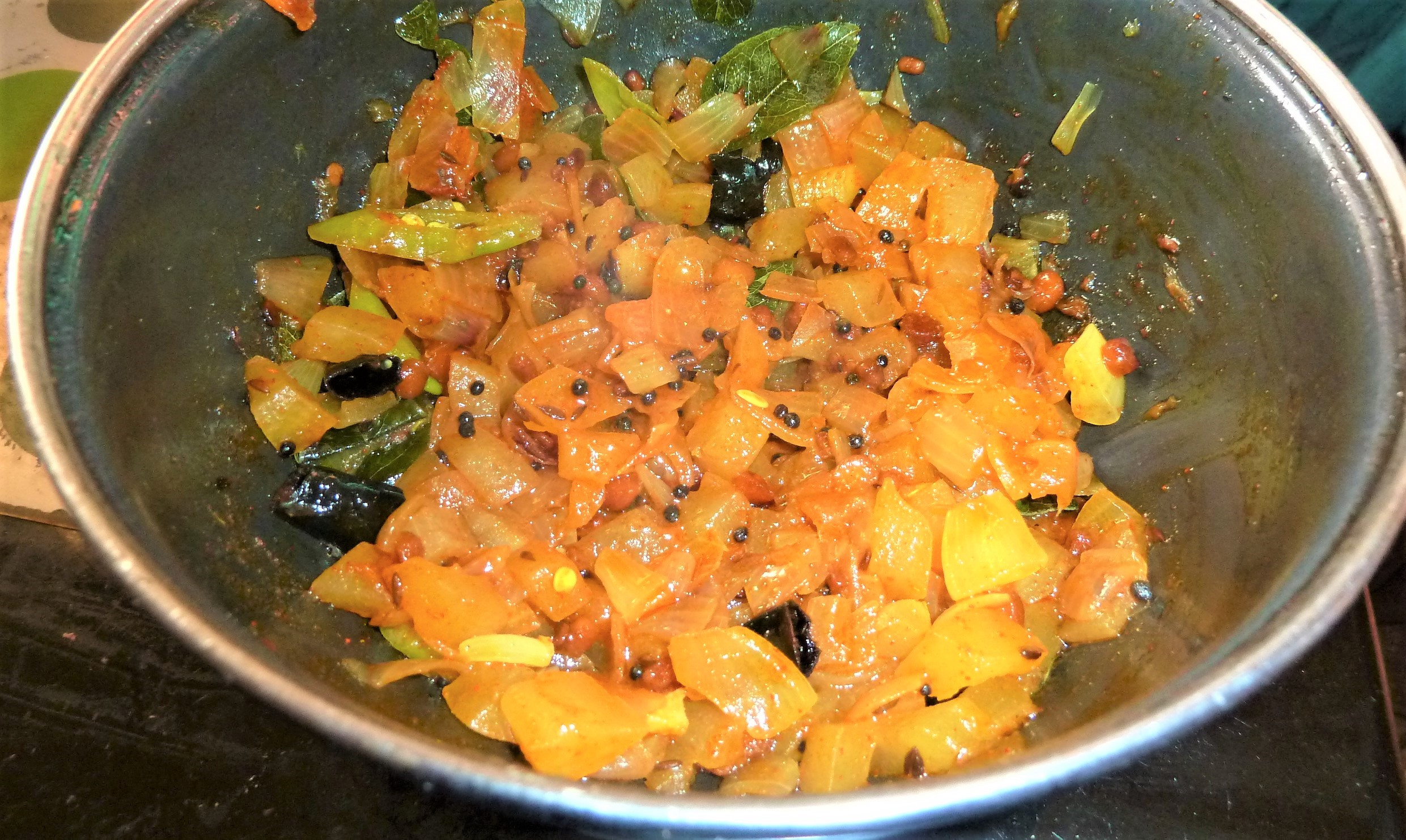 దోసకాయ ఉల్లిపాయ పోపు కూర